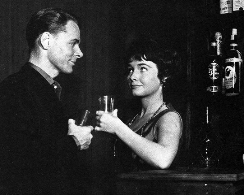 Lena Granhagen and Sven Lindberg in Irma la Douce. Scalateatern, Stockholm